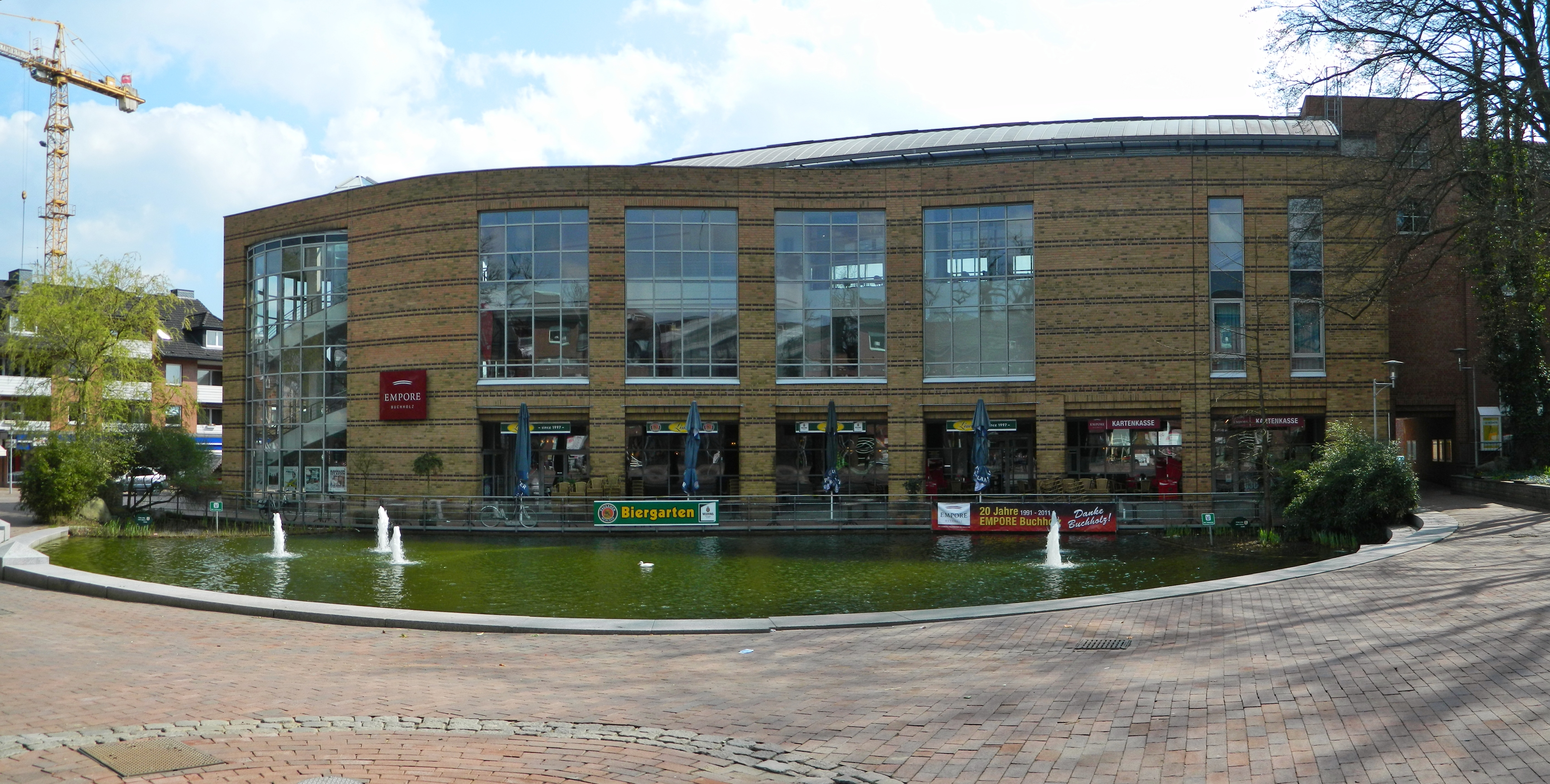 Empore